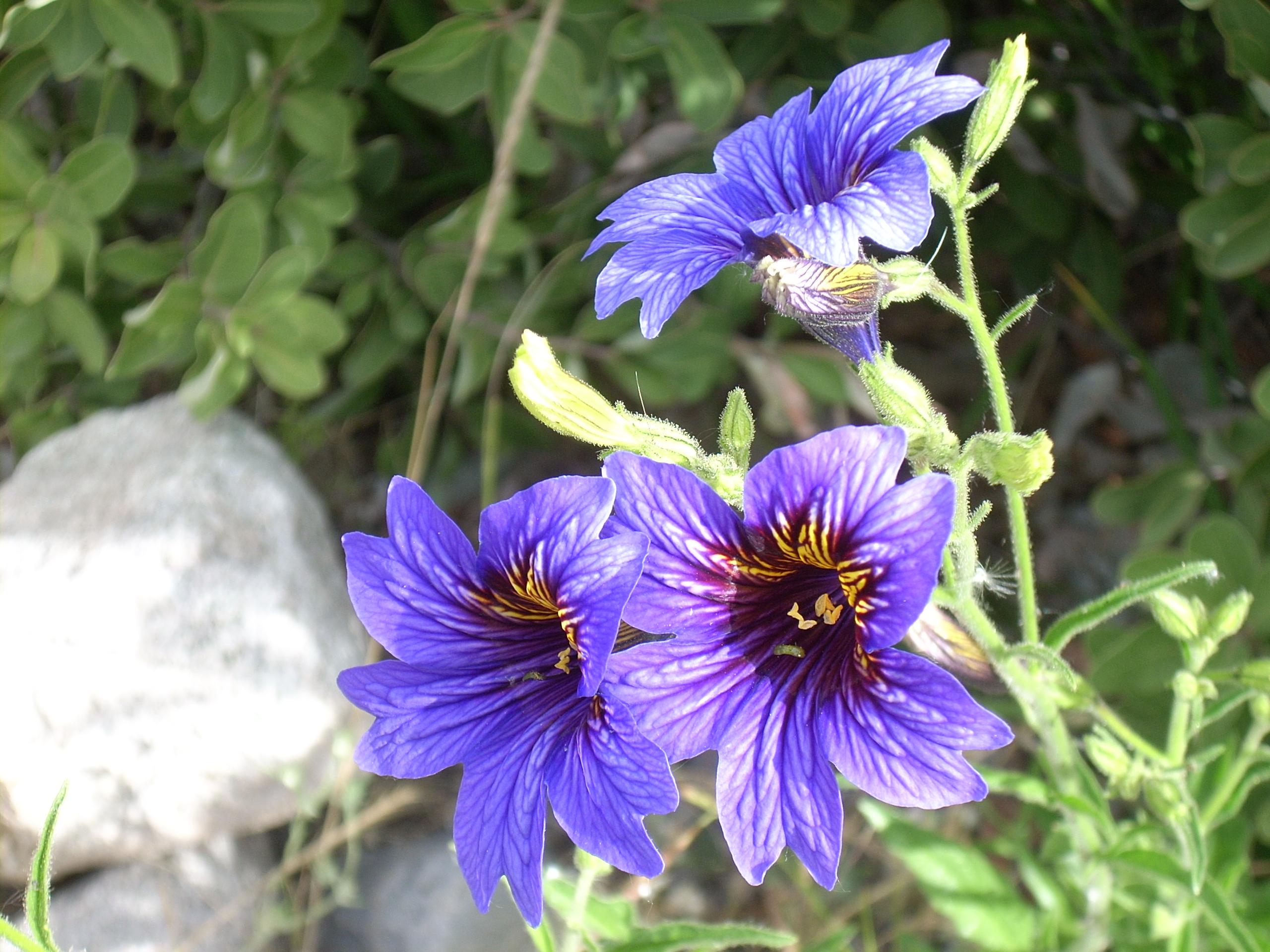 Palito amargo,. Habita desde Coquimbo a Malleco. Hierba perenne hirsuto-glandulosa. Toda la planta es pegajosa. Flores muy vistosas de 4 a 5 cm de longitud, reunidas en panoja laxa. Florece en noviembre-diciembre. Algunos individuos presentan una segunda floración en el mes de enero, pero las flores son de menor tamaño y menos numerosas. En la costa el perigonio de la flor es de color blanco con nervadura de la base teñida marrón y amarillo, hacia el interior de la región la nervadura y parte de la lámina cambia a color azul-morado y en precordillera pueden encontrarse plantas con todo el perigonio de color burdeo-azulado, encontrándose todas las combinaciones entre ambos colores. Reserva Nacional Río de los Cipreses, Provincia de Cachapoal, Región de O'Higgins, Chile